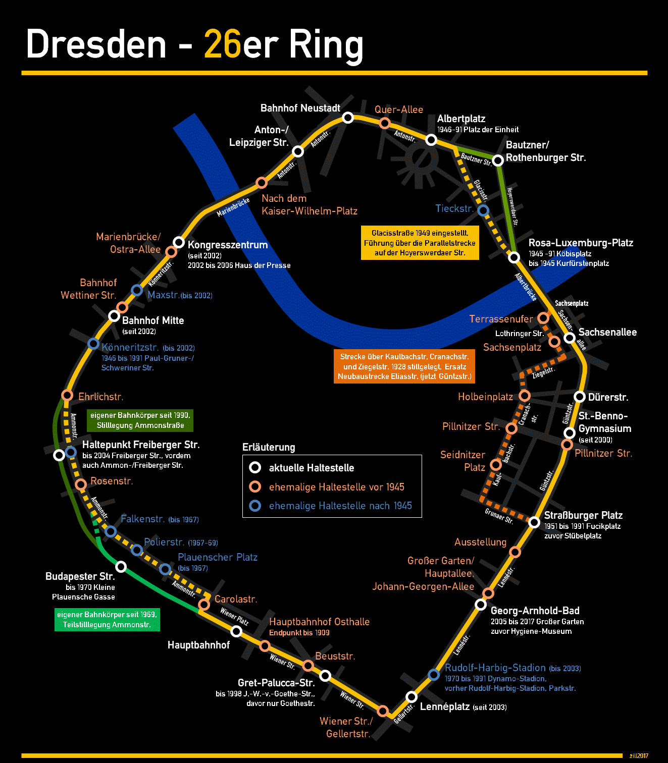 26er Ring - historische Entwicklung. Gestrichelt sind ehemalige Streckenabschnitte dargestellt (siehe Erläuterungen), durchlaufend die aktuelle Streckenführung. Der eigentliche "26er Ring" entspricht dem Verlauf der Linie 26 als Vollring (1909 bis 1948) und ist gelb dargestellt.